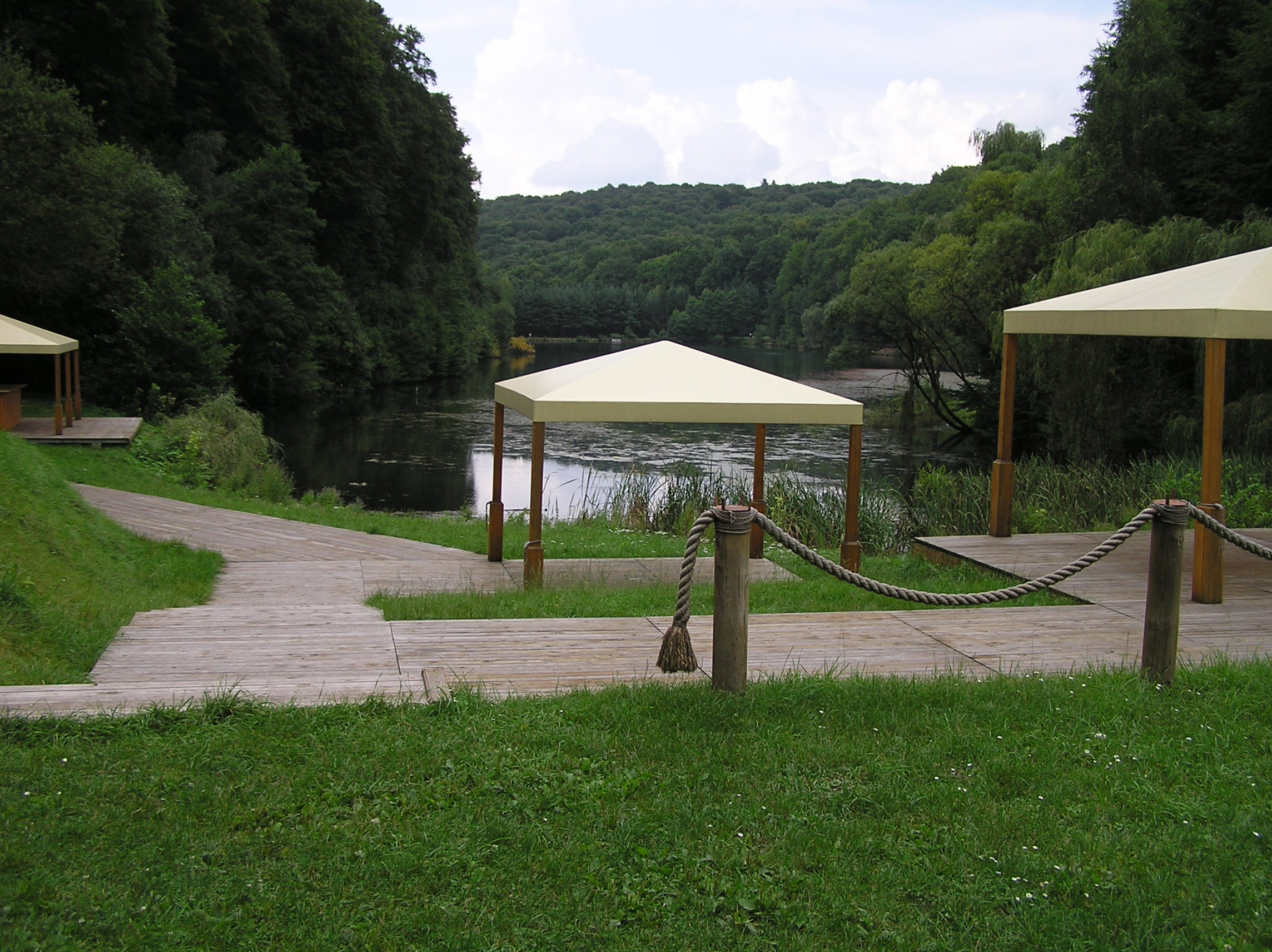 Stausee des Waldbades in Codlea, Rumänien